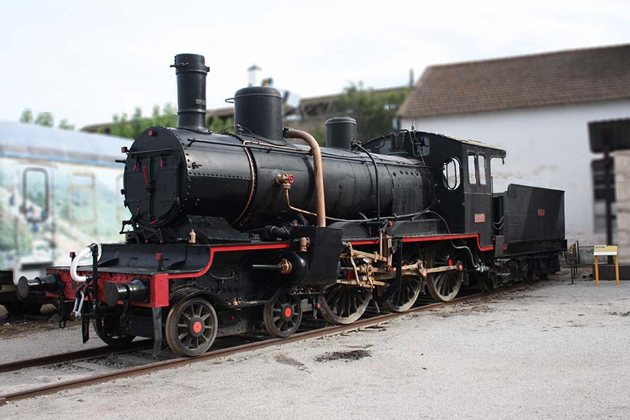 Locomotora MZA 651